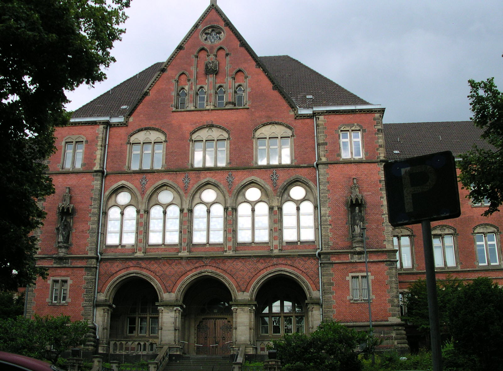 Aachen, Westseite des Landgerichts (Erweiterungsbau von 1929 an der Kongreßstraße)